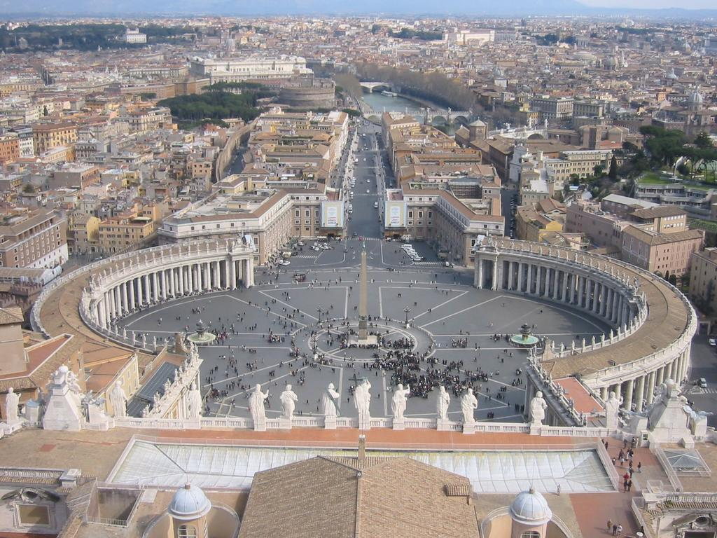 Utsikt fra kuppelen i Peterskirken utover Petersplassen.